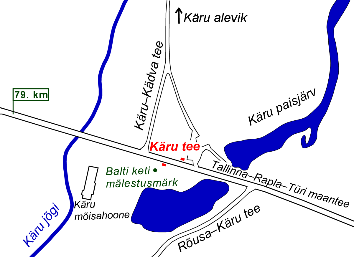 Käru tee kaart